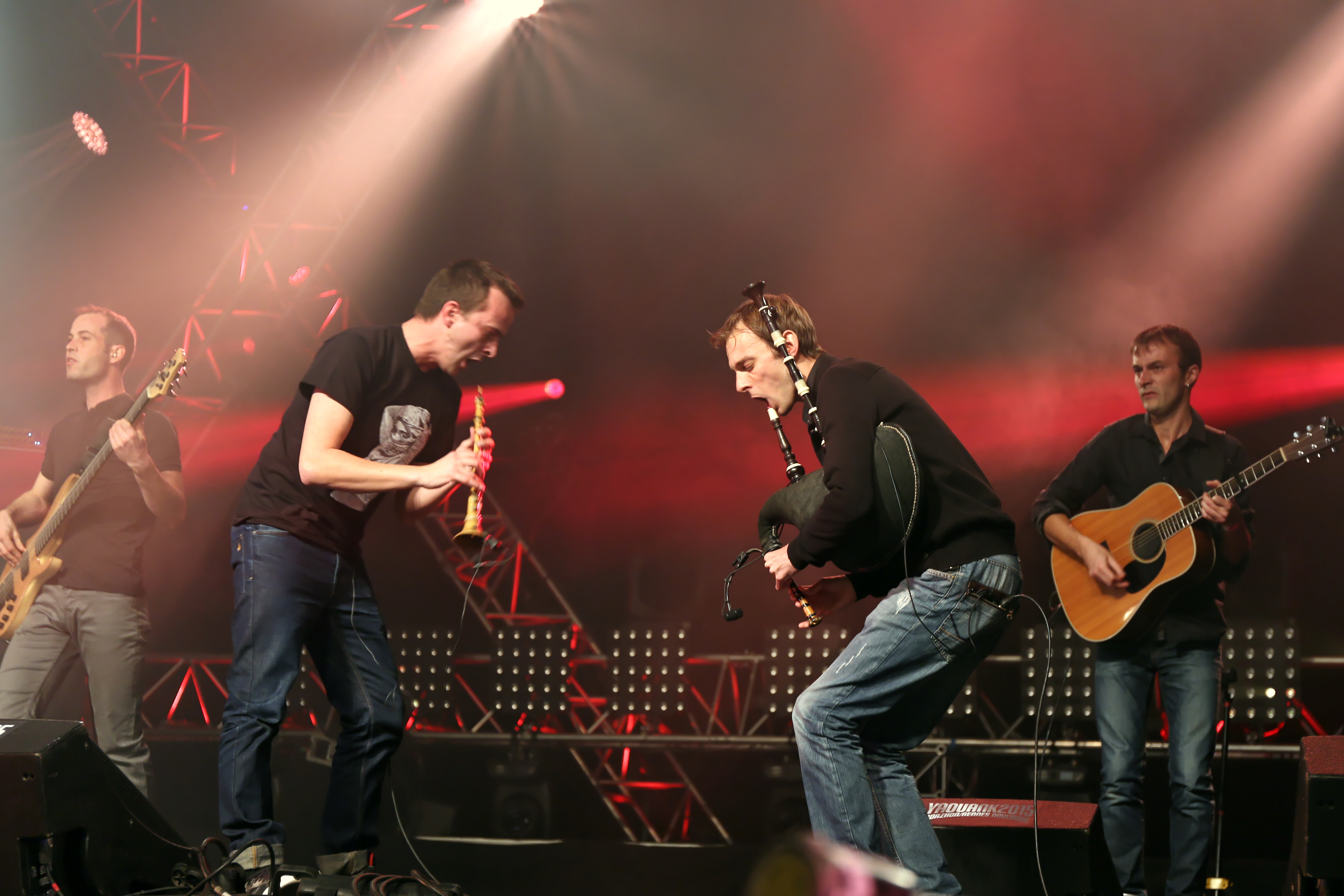 Startijenn en fest-noz lors du festival Yaouank le 21 novembre 2015 au Parc des Expositions de Rennes.